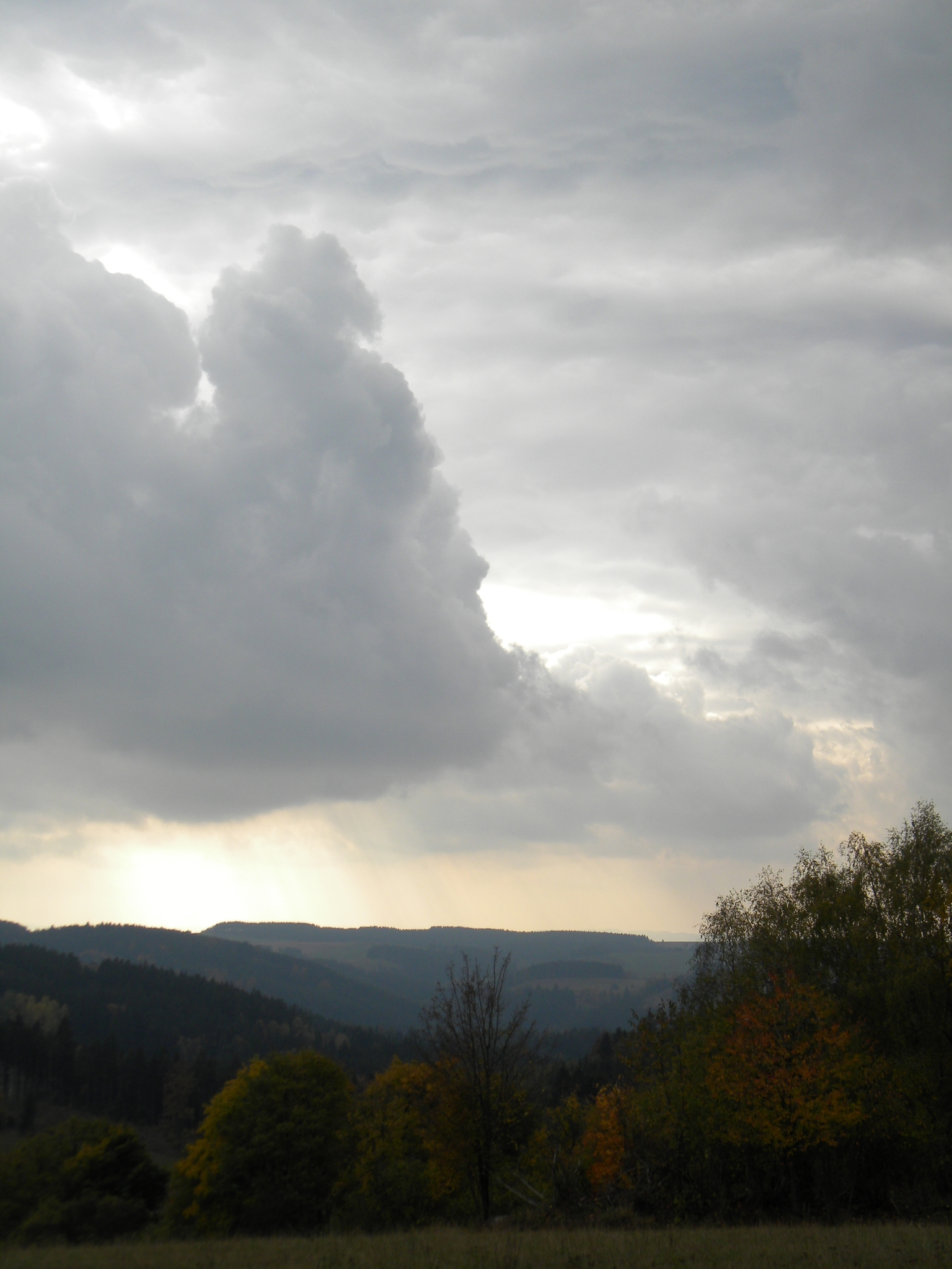 Ukončení Koníkovského hřbetu u Ždánic od severu; prameniště Karasínského potoka.